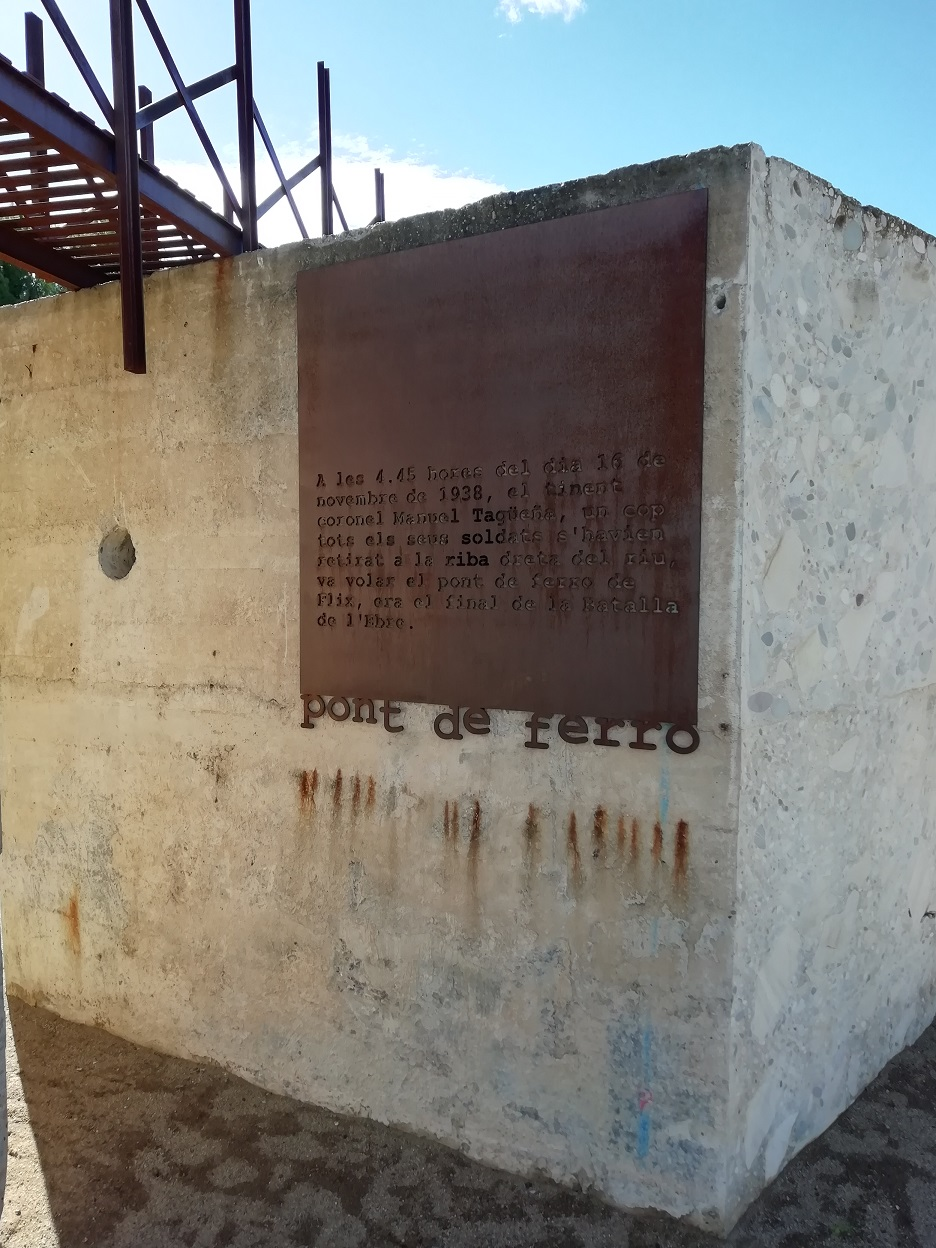 Memorial del Pont de Ferro en recuerdo de las víctimas de la Batalla del Ebro.